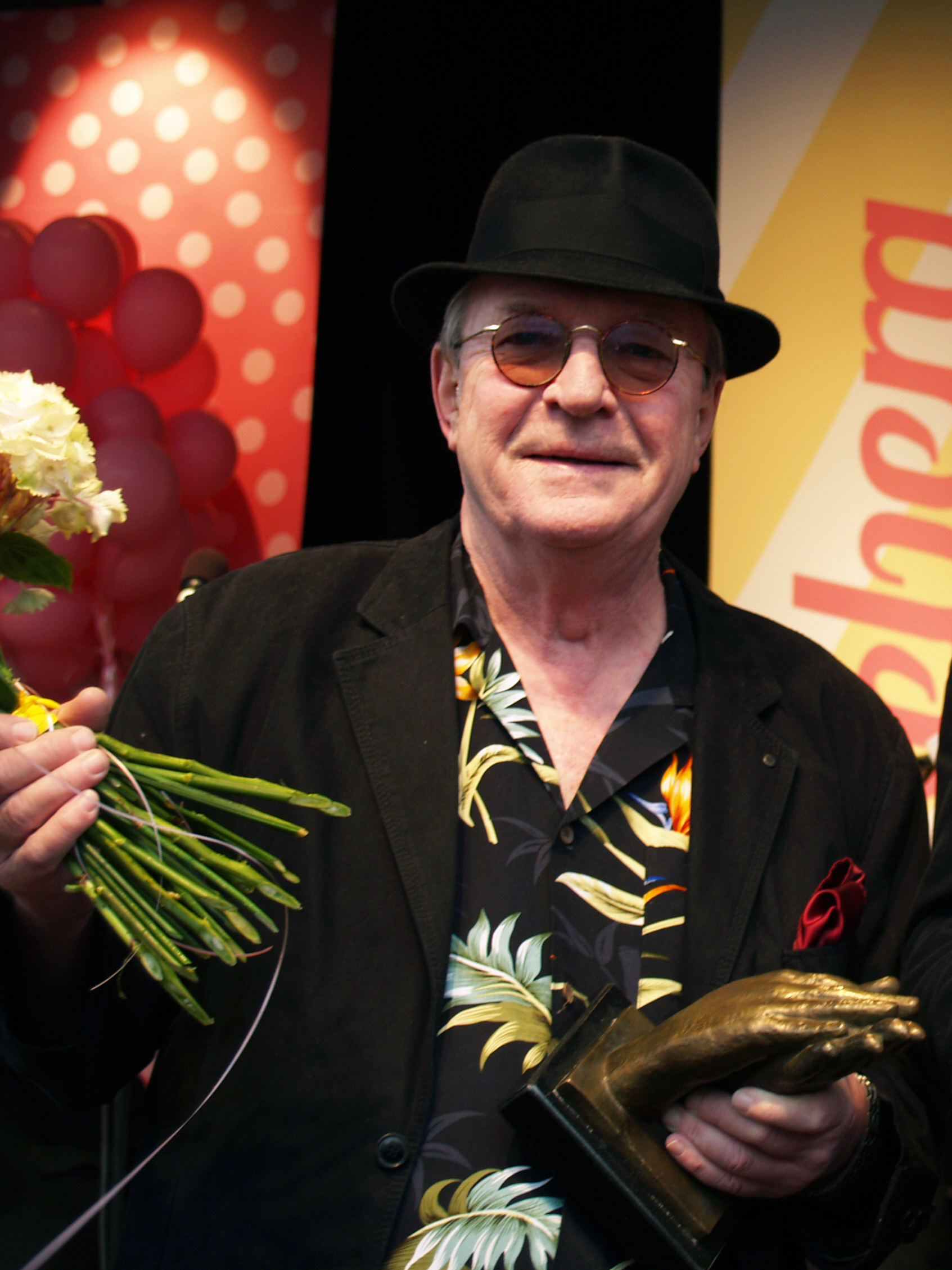 Brasse Brännström efter att ha fått Lisebergsapplåden 2013.